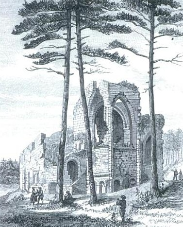 La basilique Notre-Dame-de-la-fin-des-Terres de Soulac au XIXe siècle. Dessin paru dans le Monde Illustré en 1862.